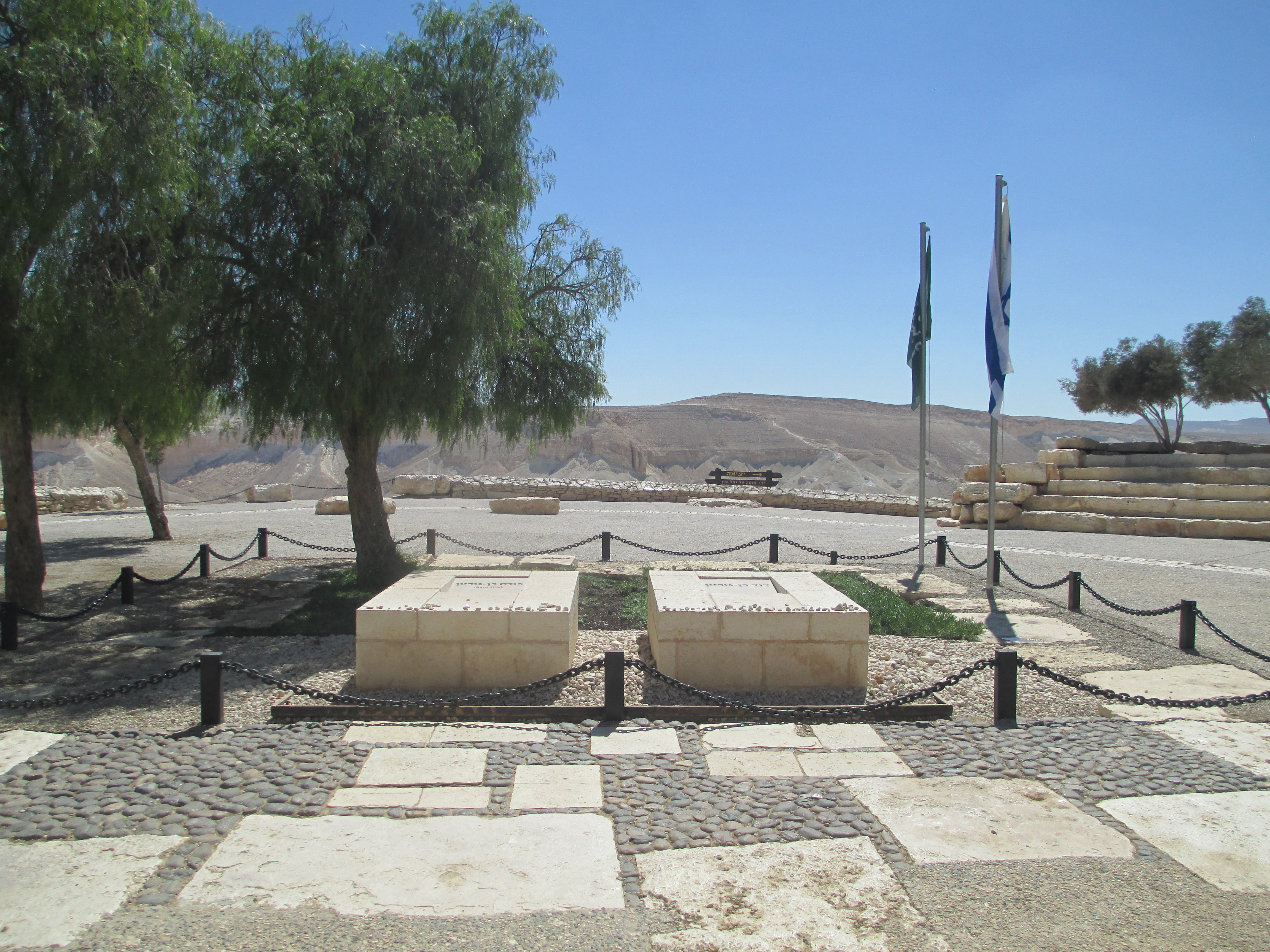 קברי פולה ודוד בן גוריון